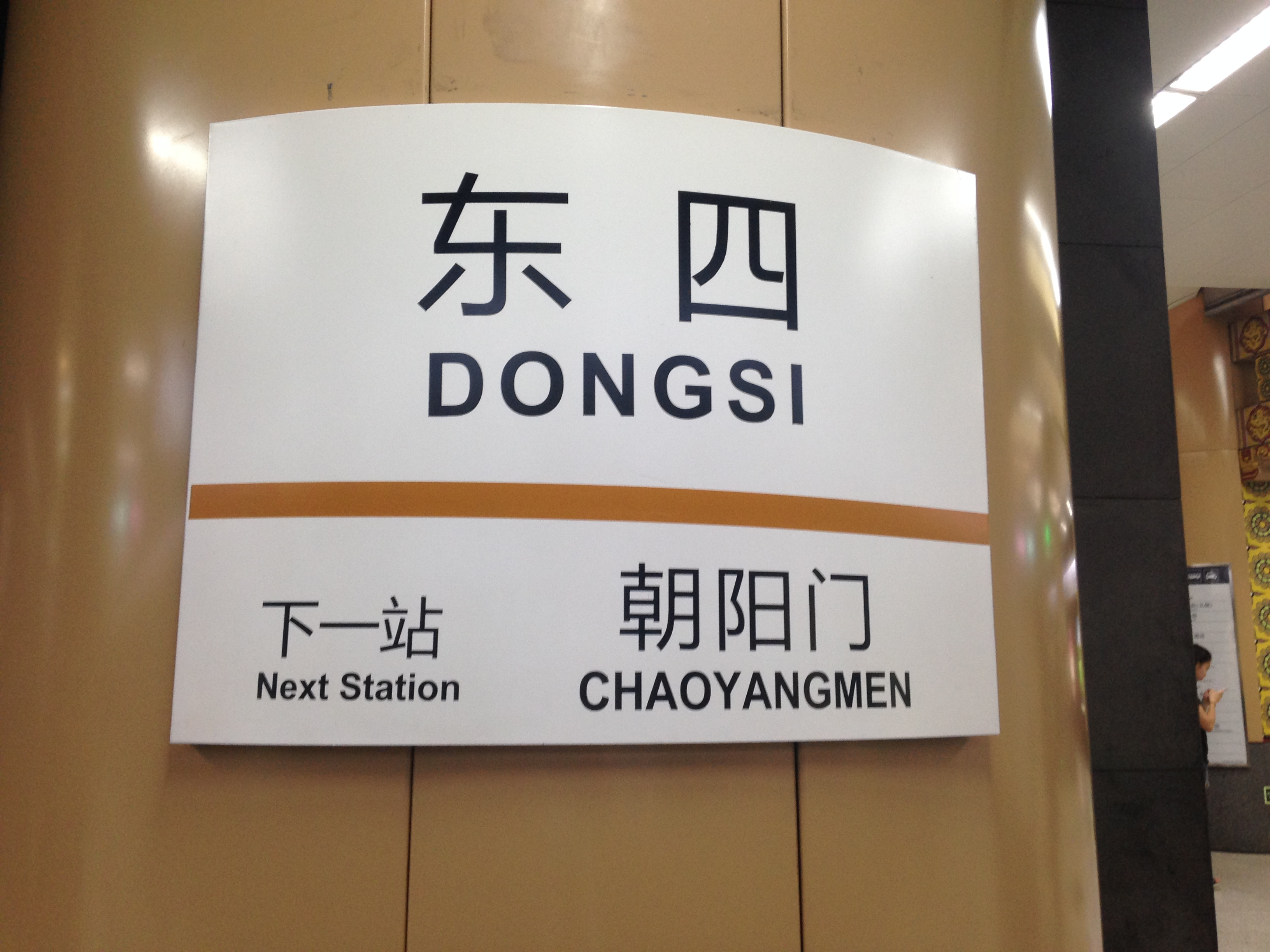 東四駅(北京地下鉄6号線)の駅名標